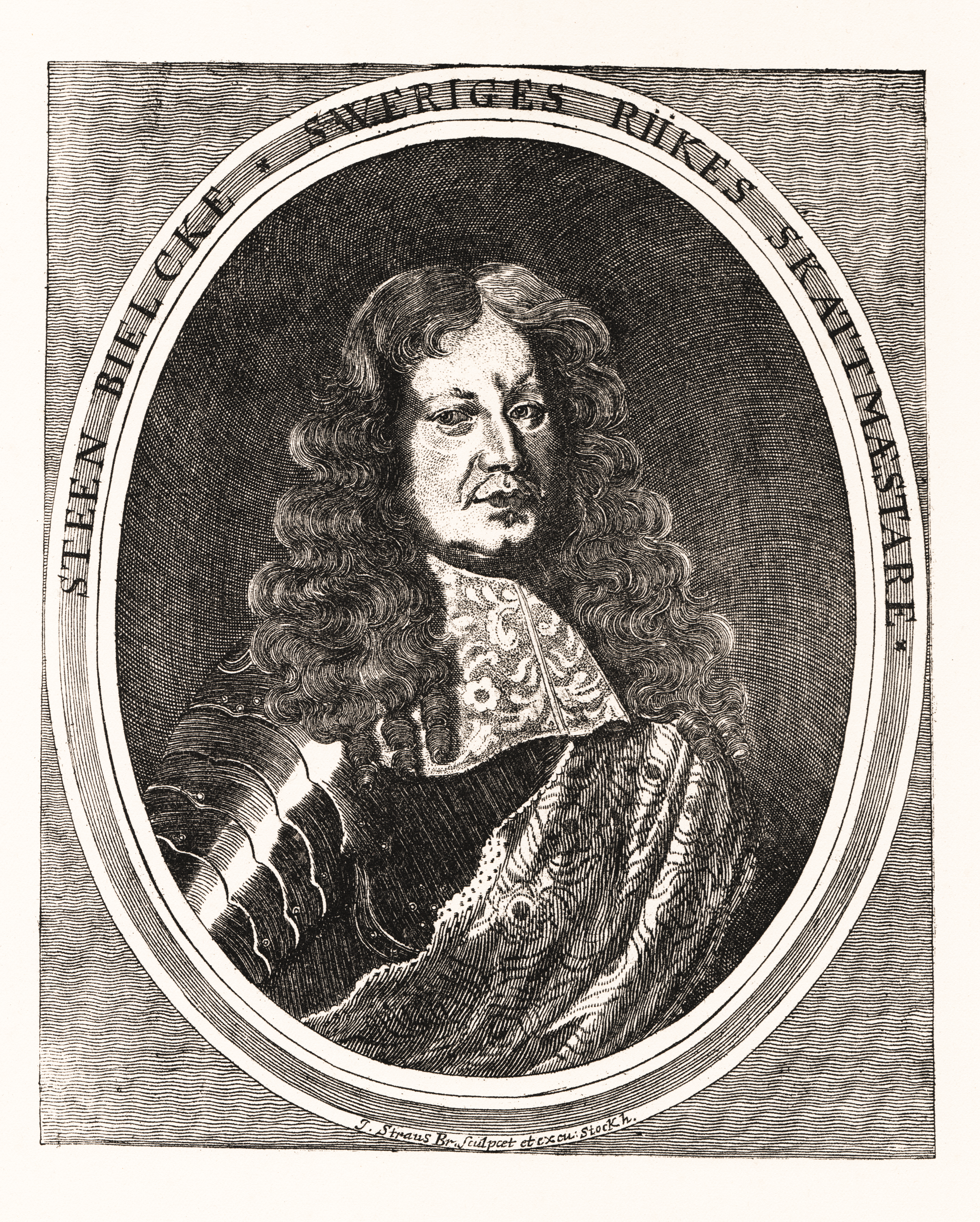 Sten Nilsson Bielke (1624-1684). Kopparsticket är utfört av Strauss, samt tillhör en serie bilder av Carl XI, Hedvig Eleonora samt innehavarna av riksämbetena, avsedda för den 1674 utgivna Keyserska bibelupplagan.